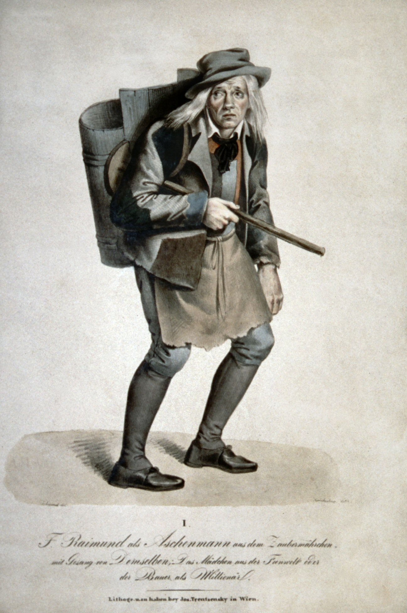 Ferdinand Raimund (1790-1836) als Aschenmann in Das Mädchen aus der Feenwelt oder Der Bauer als Millionär.. Lithographie von Josef Kriehuber, um 1825